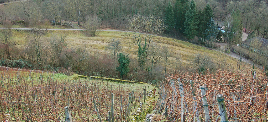 Markgröningen: Hohlweg-Relikte der Vorderen Steige am Schlüsselberg